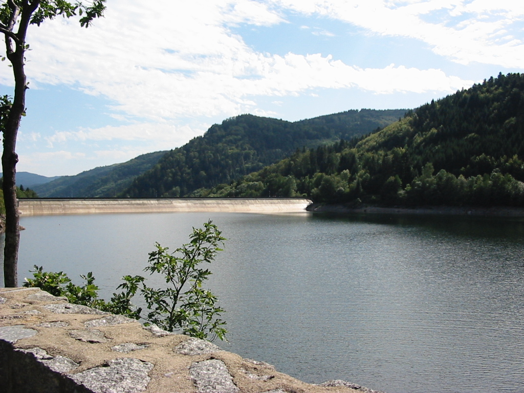 Barrage du lac de Kruth-Wildenstein Département du Haut-Rhin (France)